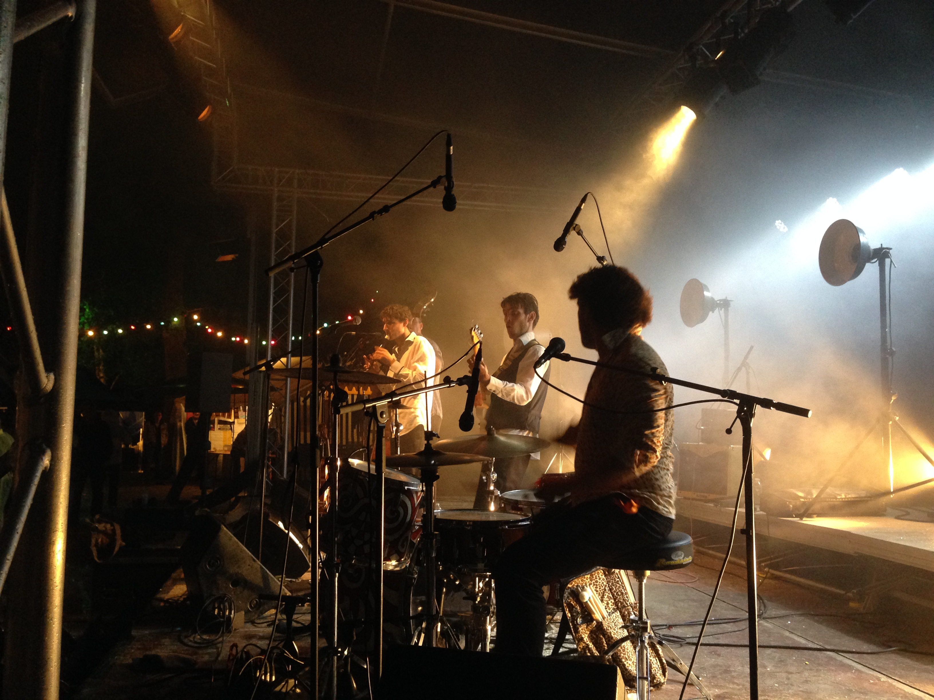 Cliché concert d'un des groupes du festival